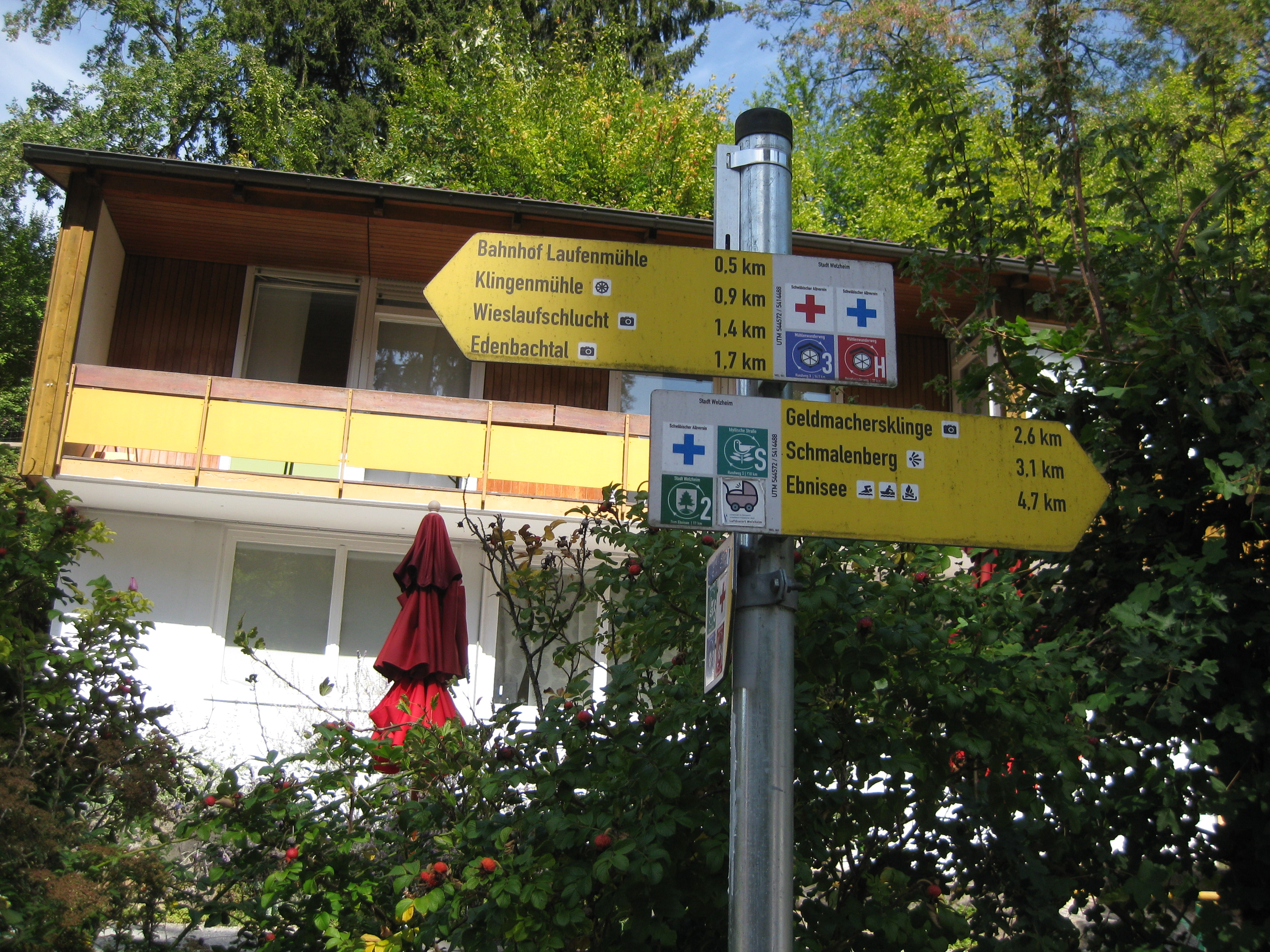 Erfahrungsfeld der Sinne Eins+Alles, ein Freizeit- und Erlebnispark im Welzheimer Wald